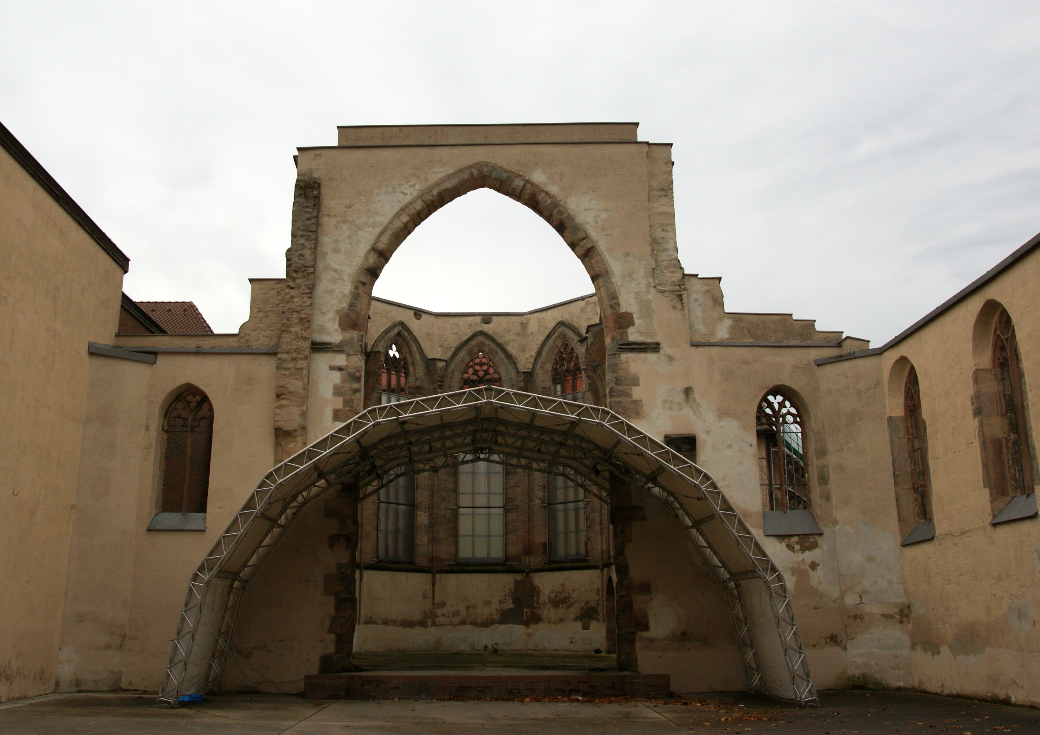 2009-11-14 Nürnberg 050, Katharinenkloster